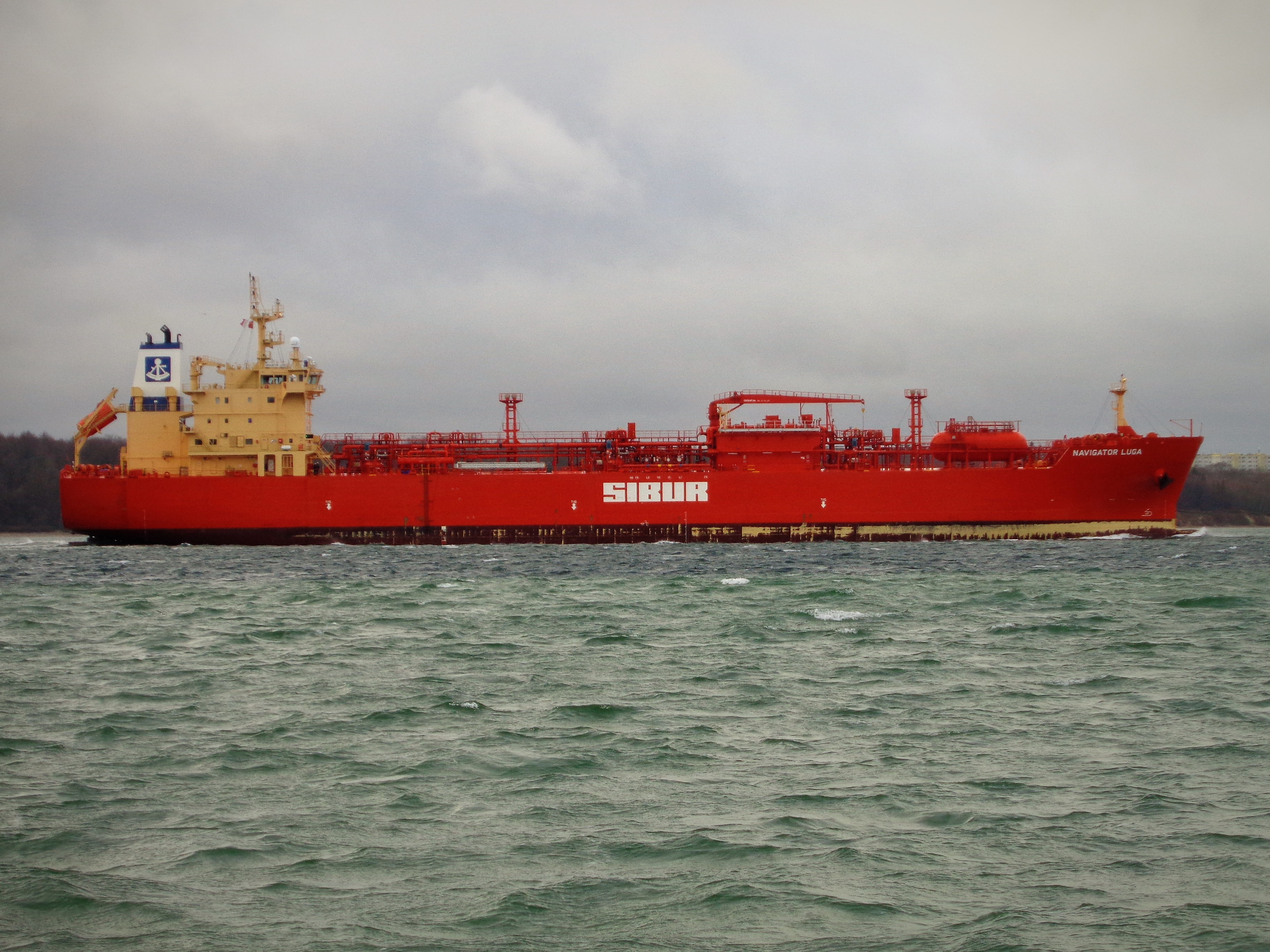 Der LPG-Tanker Navigator Luga bei der Ausfahrt aus der Kieler Förde, aufgenommen vom Laboer Strand aus. IMO: 9761164 MMSI: 636017417